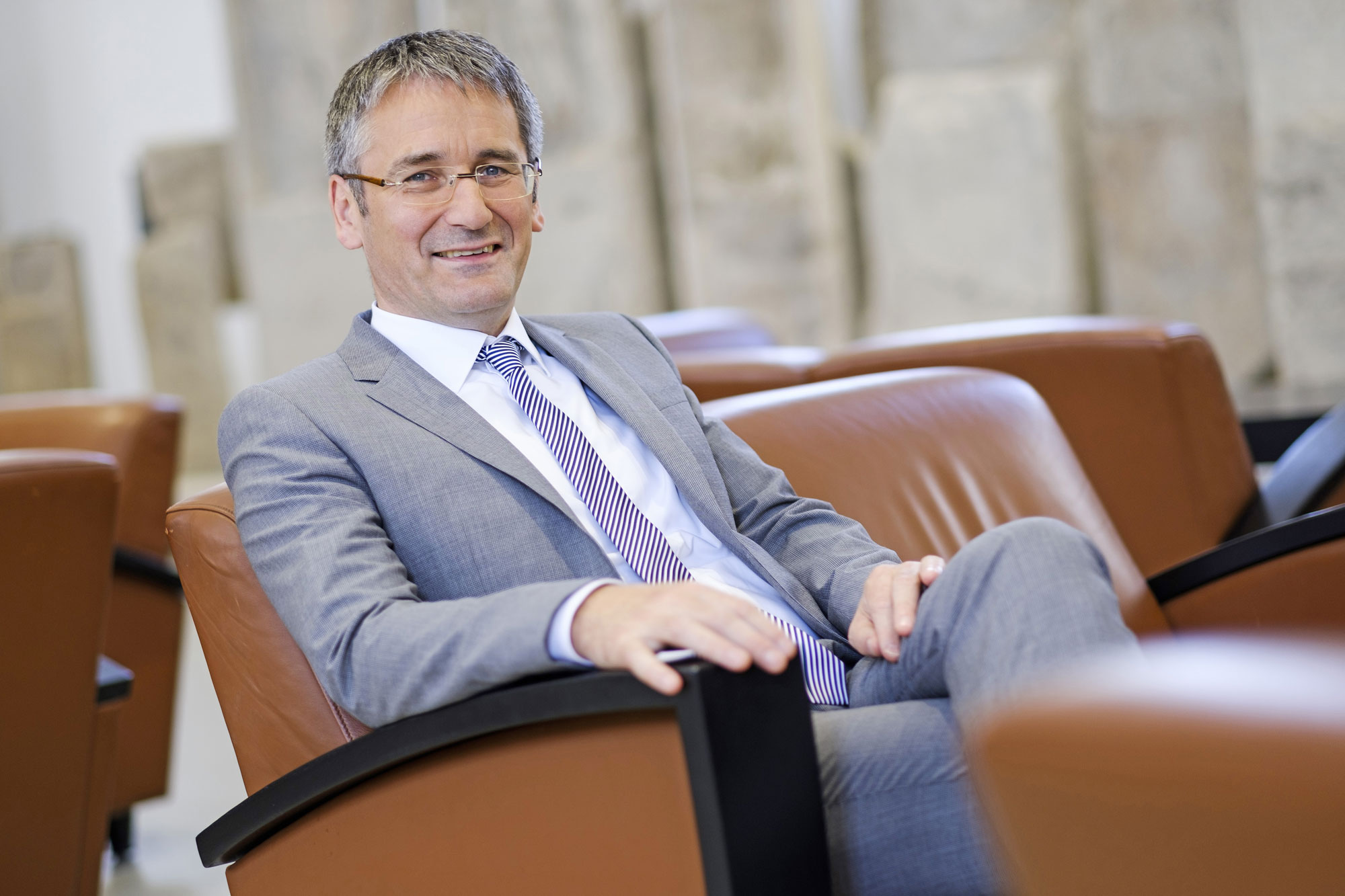 Präsident des Landtags Rheinland-Pfalz